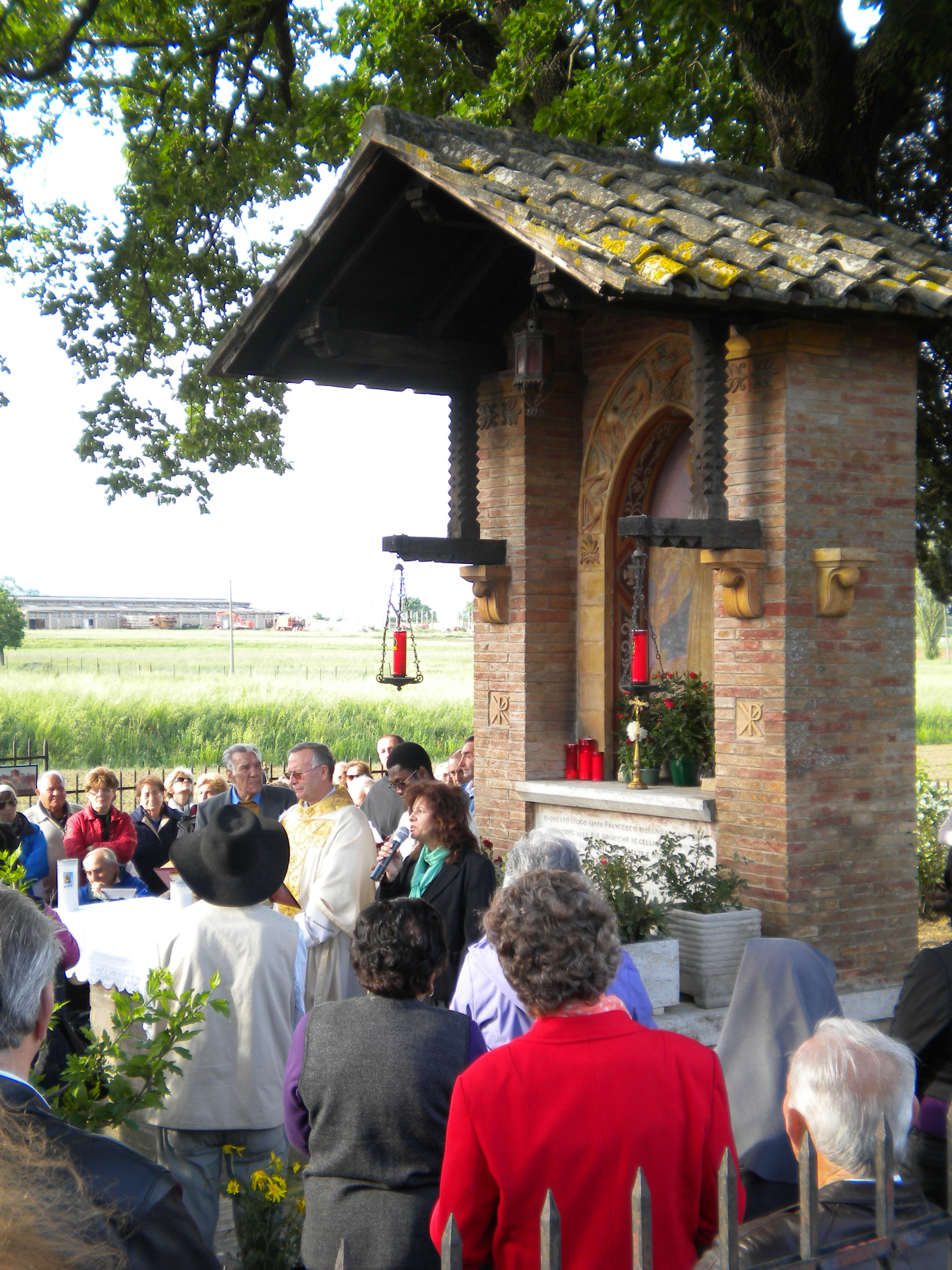 celebrazione liturgica davanti all'edicola di Piandarca a Cannara (PG). Conclusione della tradizionale processione lungo l'antica strada che congiungeva il castello di Cannara a quello di Bevagna passando per il punto esatto dove, secondo la tradizione, ebbe luogo la predica agli uccelli di San Francesco segnalato da una pietra a qualche centinaia di metri dall'edicola.